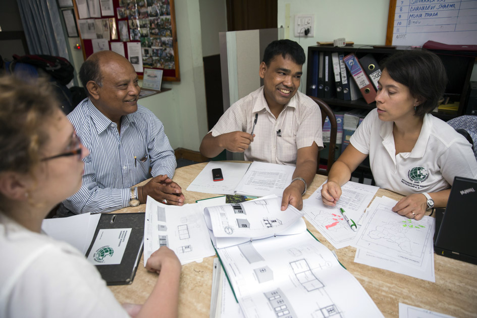 Planungsphase für neue Gesundheitsposten: Der Bauingenieur Mr Dipak Narayan Biswokarma (hinten links) erklärt Victoria Arnlind (vorne links), Eliette Fischbach (vorne rechts) und Dhurba Shreshta (hinten rechts), Projektkoordinator von SWAN wie der Bau des Gesundheitspostens geplant ist.